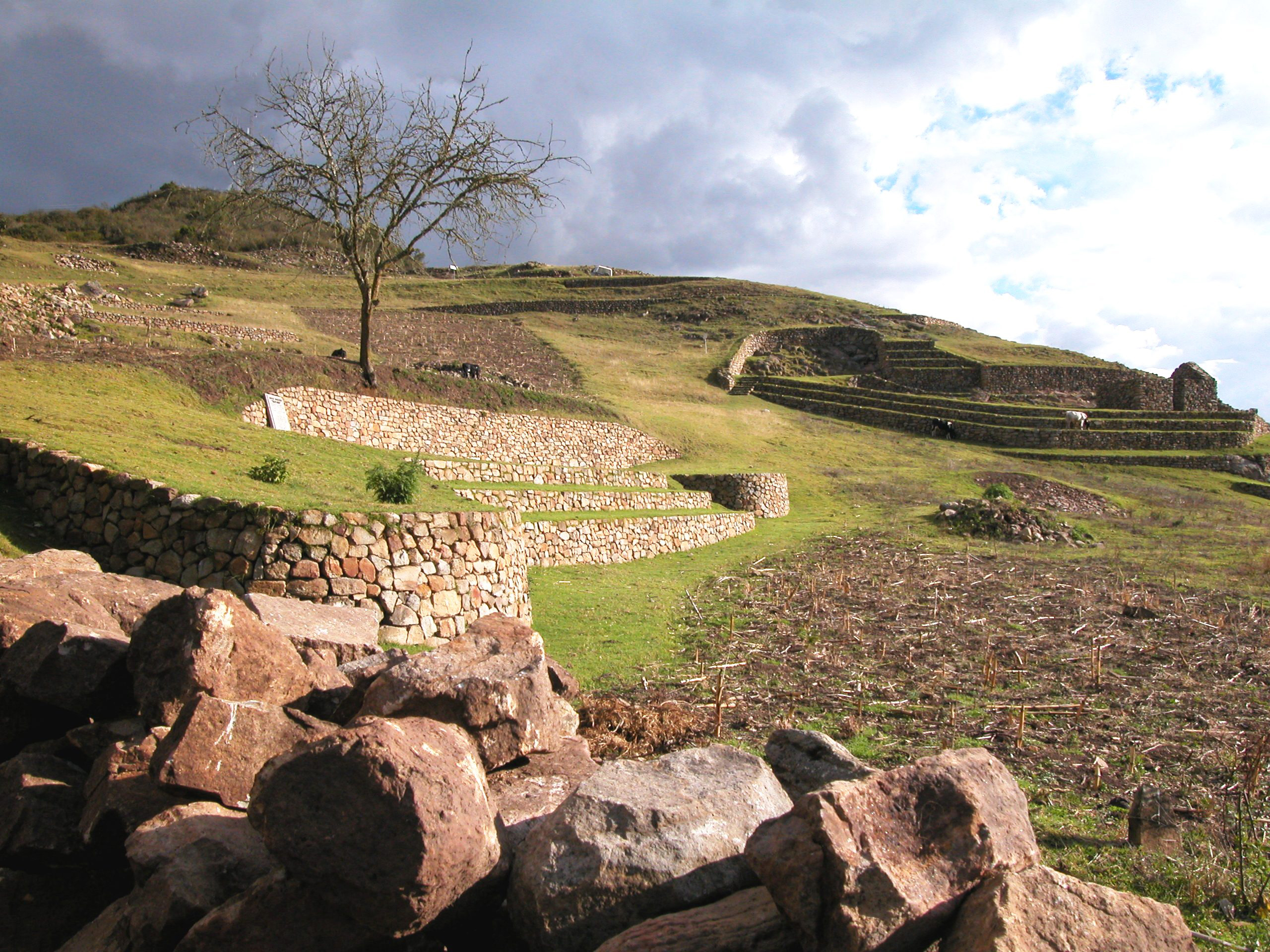 Complejo Arqueológicas de Cojitambo (11)